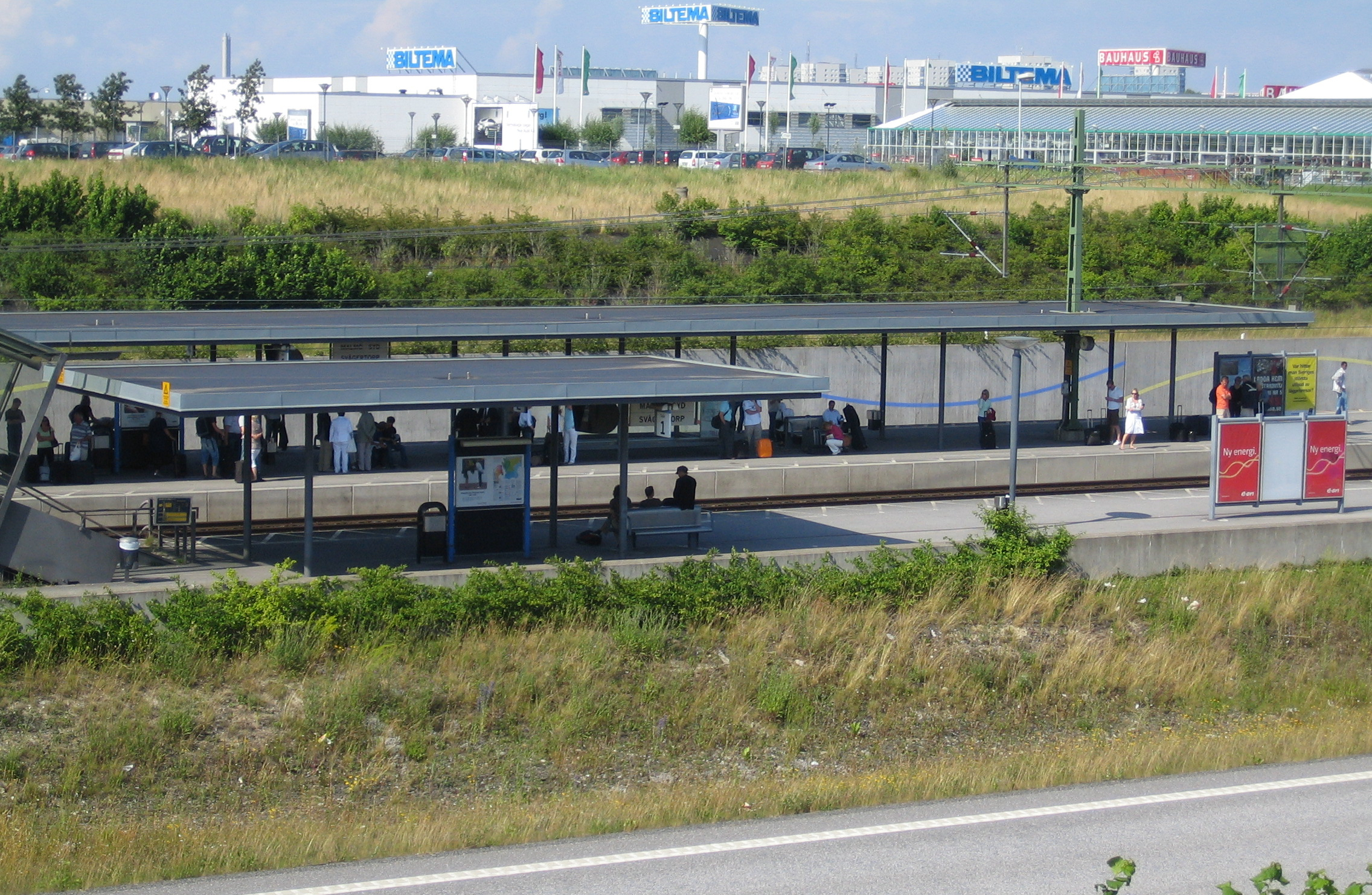 Svågertorp railway station, Malmö.